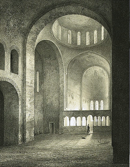 Abkhasie. Basilique de Pijzjounda